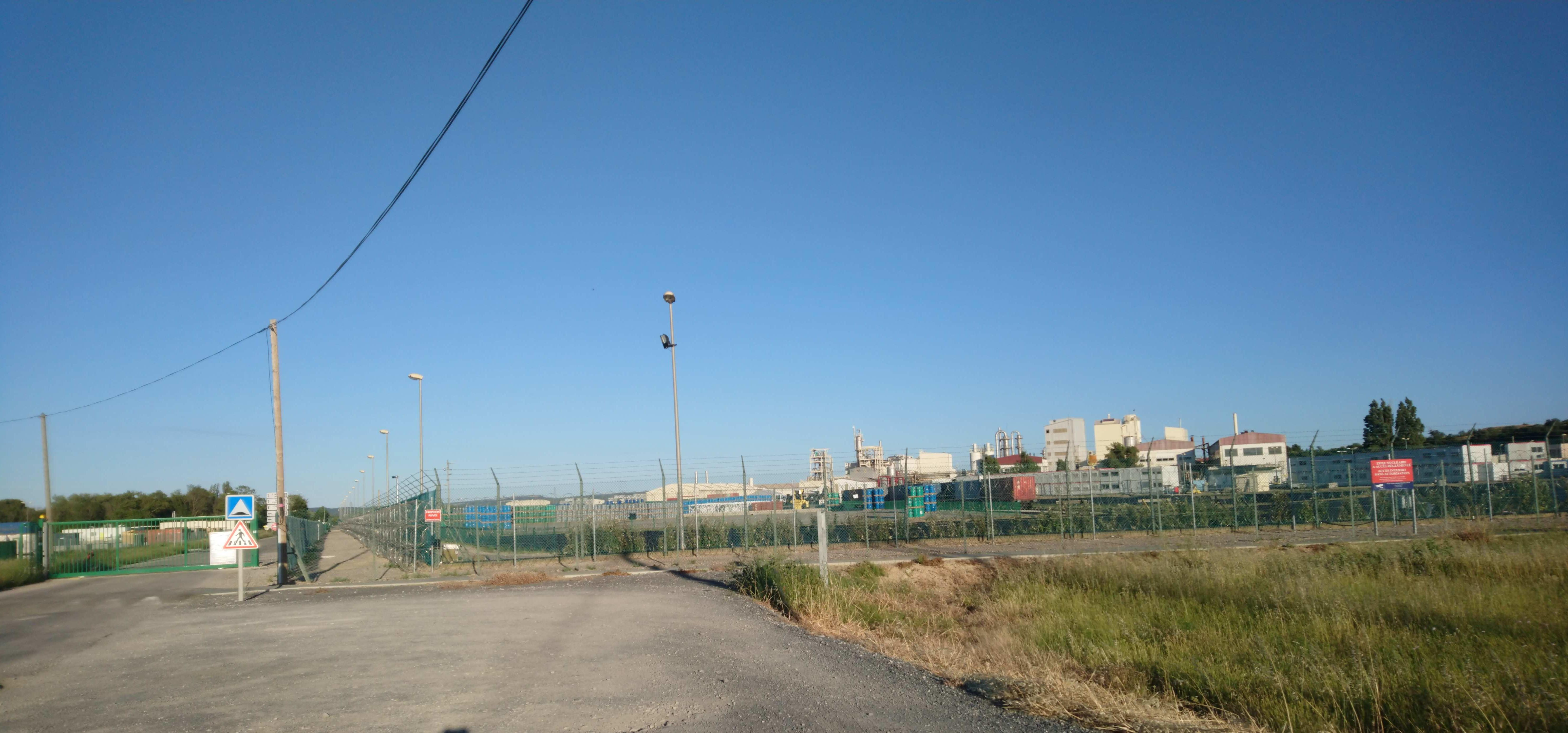 Extérieur du site, côté nord. Améliorations de la sécurité d'accès : après le corridor un renforcement de la double cloture, et ajouts de double barbelés sur toute la hauteur. Vue sur les principales installations et à gauche sur l'entreposage de conteneurs (entre autre des concentrés d'uranium)